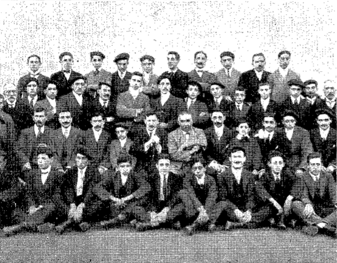 Cipriano Rodríguez Montes y Manuel Prendes con la Juventud jaimista de Gijón